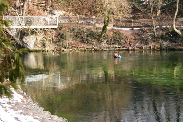 Le Aachtopf, source la Radolfzeller Aache avec un plongeur sortant du syphon Photographe: Beideler René License